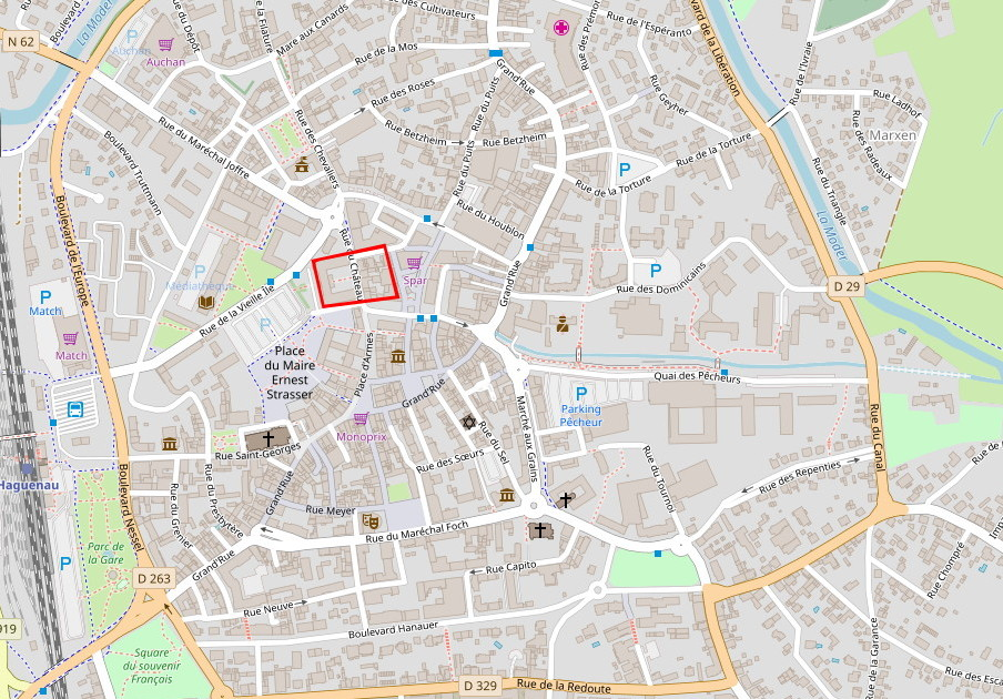 Lage der Kaiserpfalz Hagenau This map may be incomplete, and may contain errors. Don't rely solely on it for navigation.